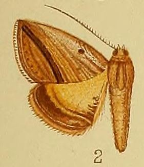 Gnamptogyia diagonalis